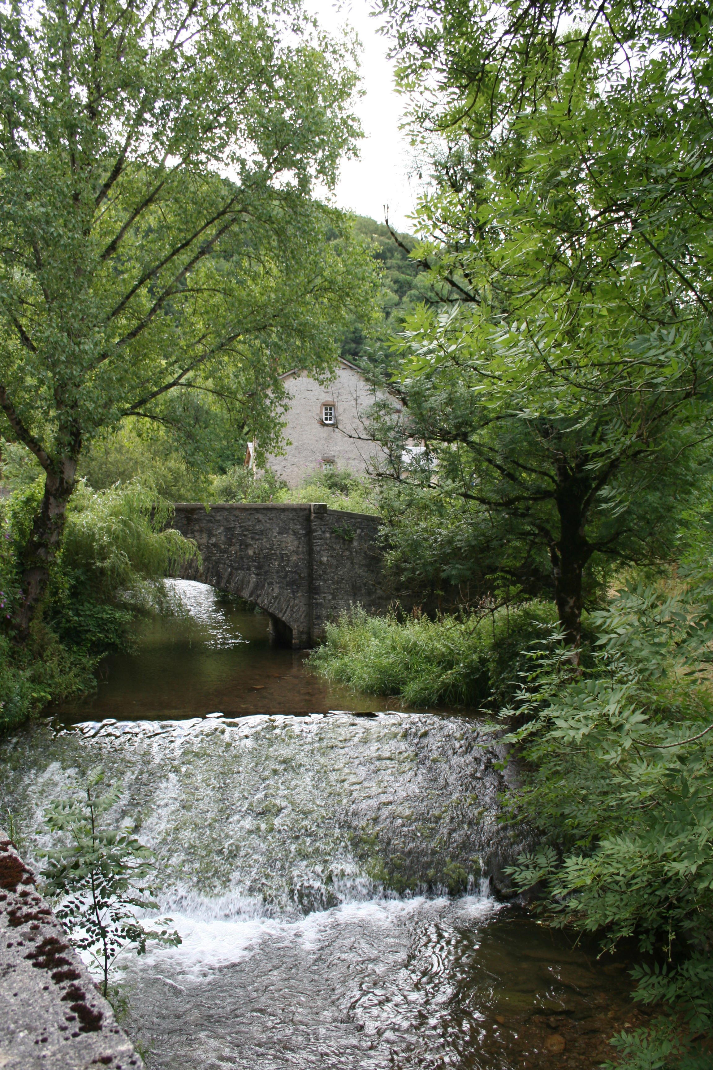 Gijounet (Tarn) - pont sur le Gijou.